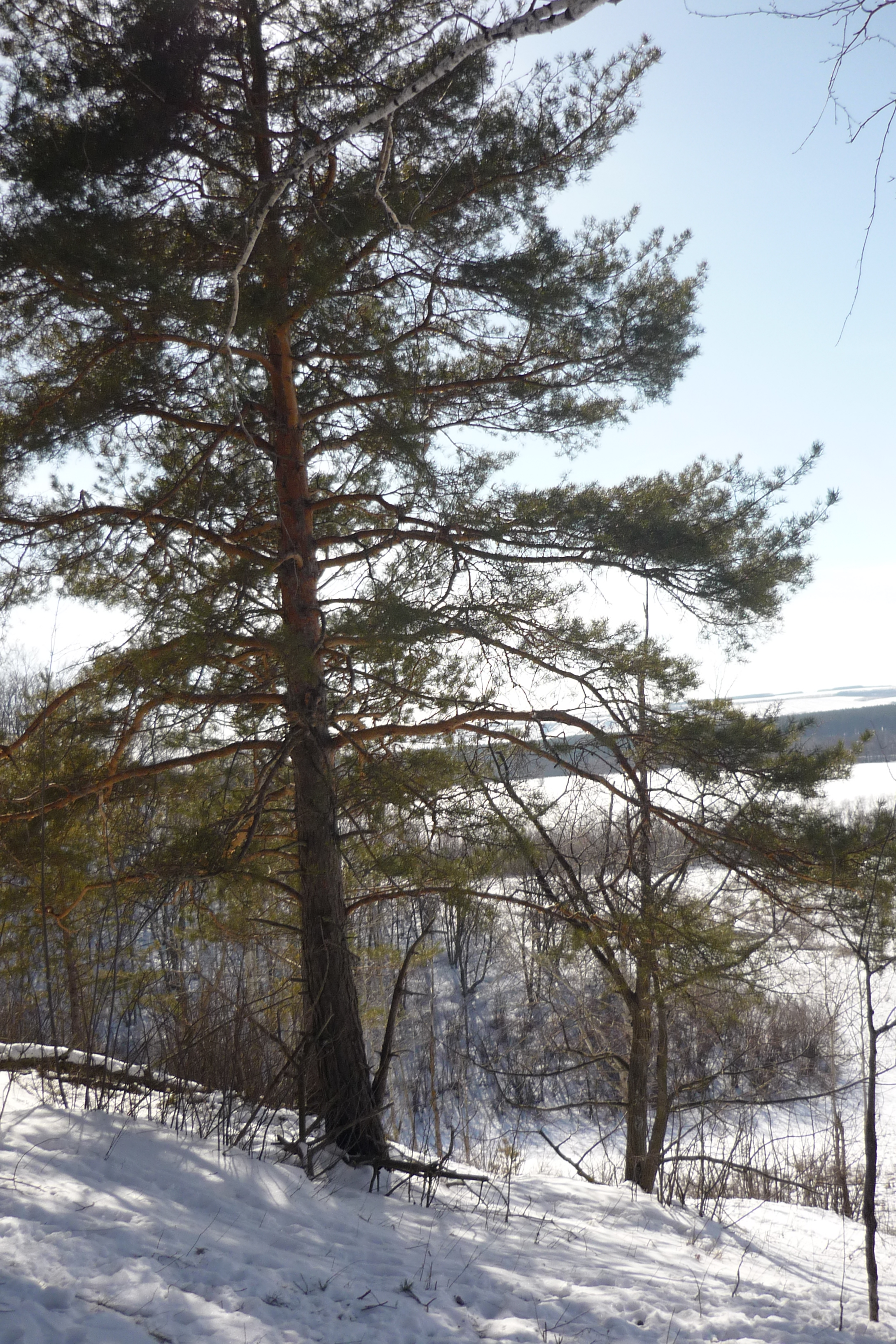 Сосна меловая. Белгородская Область.